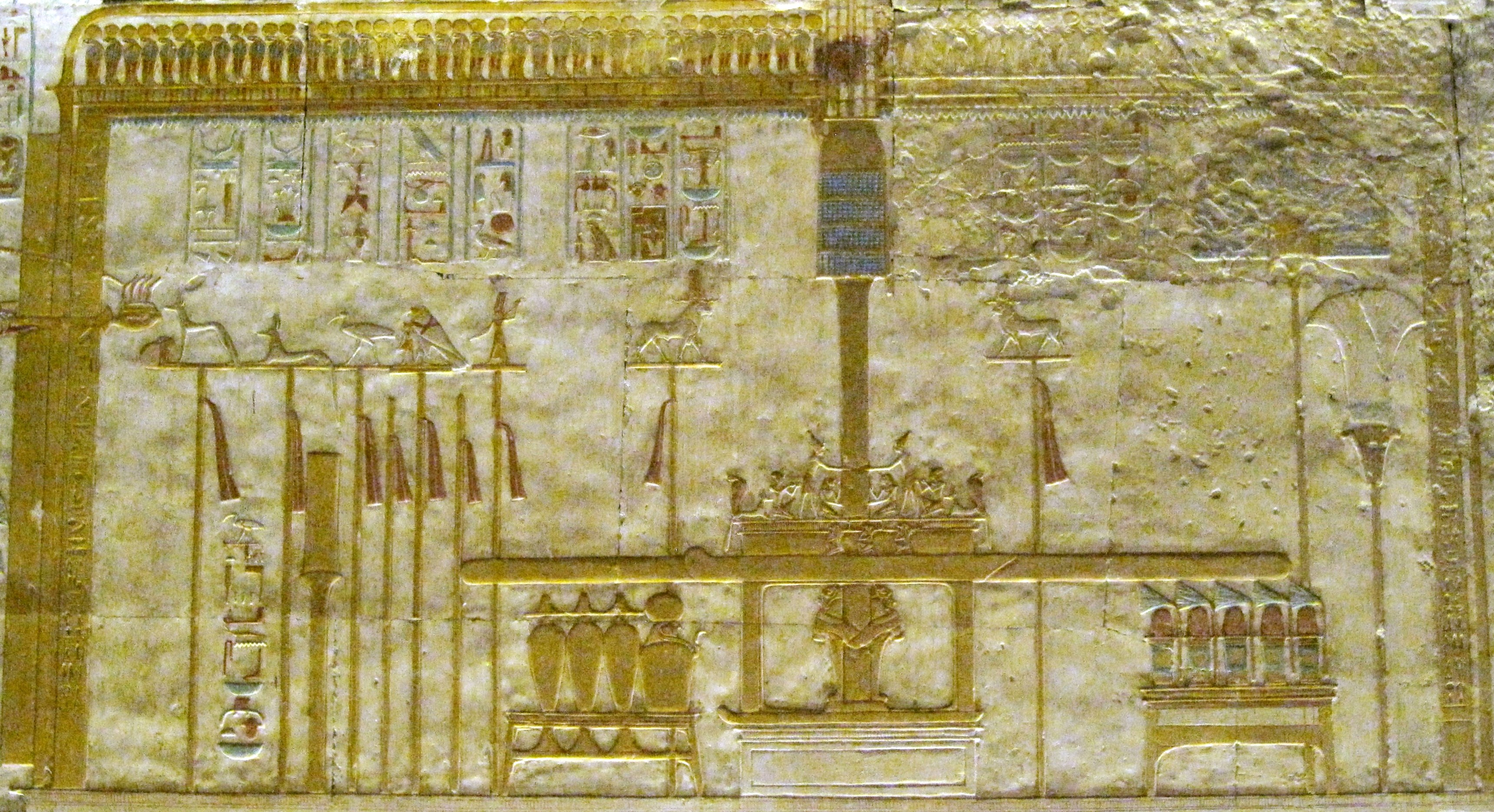 Relief im Totentempel Sethos I. in Abydos, Ägypten